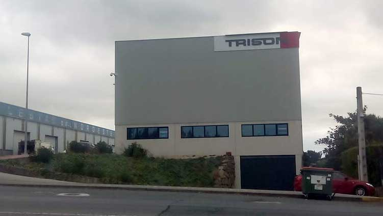 Sede de Trisón en Bergondo.